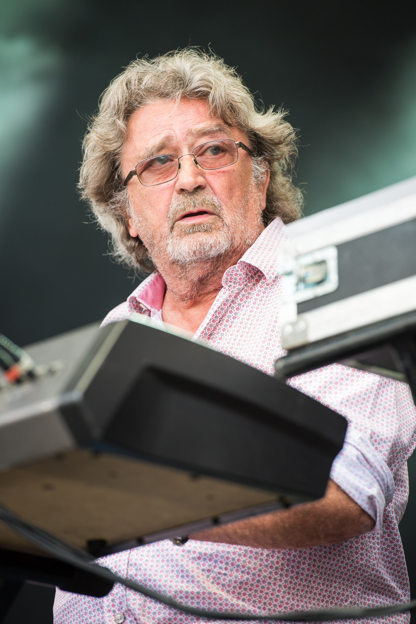 Chick Churchill,Concertbüro Franken,Festival,Konzert,Lieder am See,Livekonzert,Livemusik,Michael George Churchill,Musik,Ten Years After